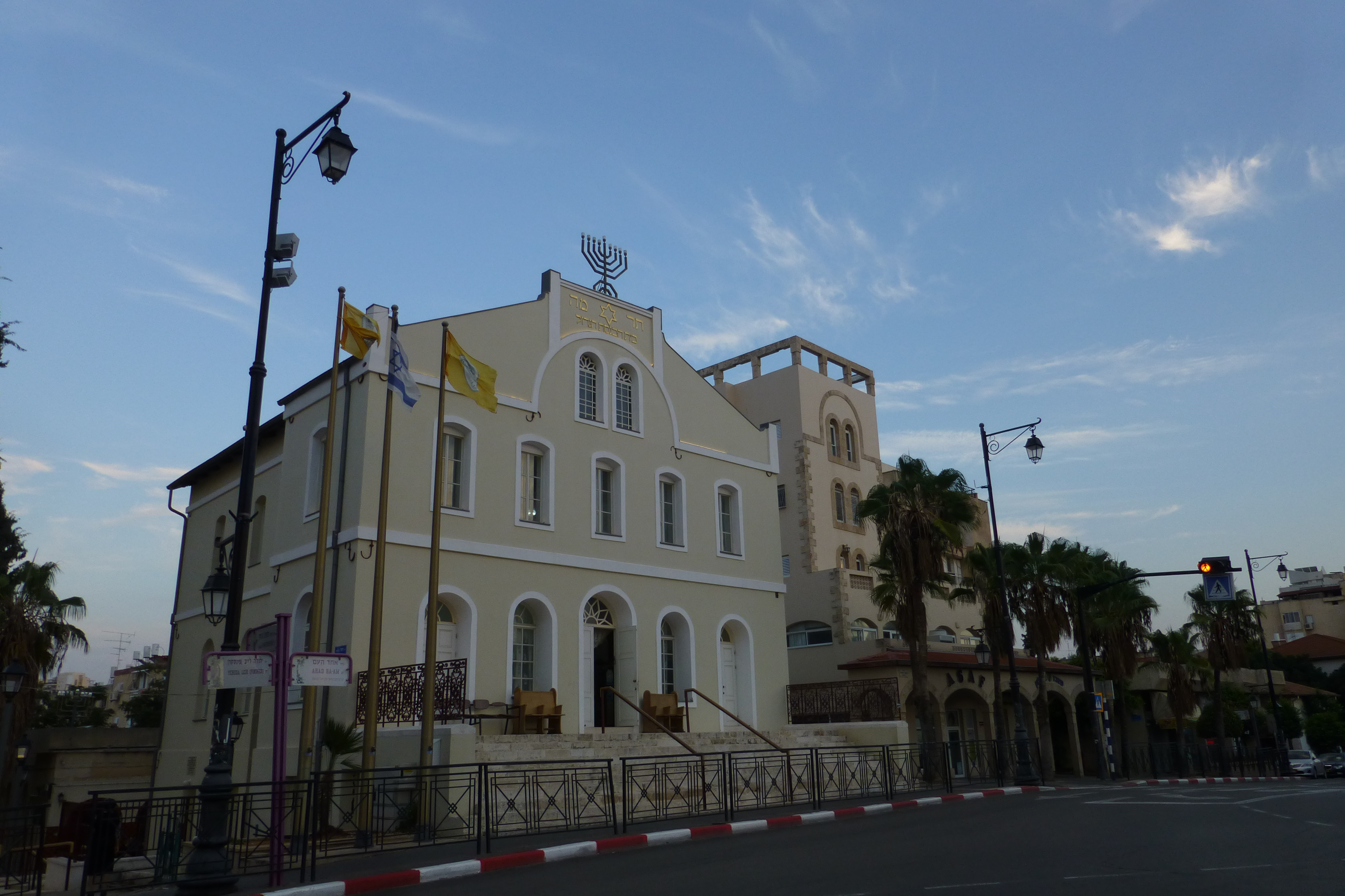 בית הכנסת הגדול בראשון לציון נבנה בשנים 1885–1889, והיווה מוקד חשוב בחיי המושבה. בית הכנסת ניצב על פסגת גבעה, בקצה רחוב רוטשילד וכיכר המייסדים במפגש עם רחוב אחד העם, והוא בולט למרחוק.